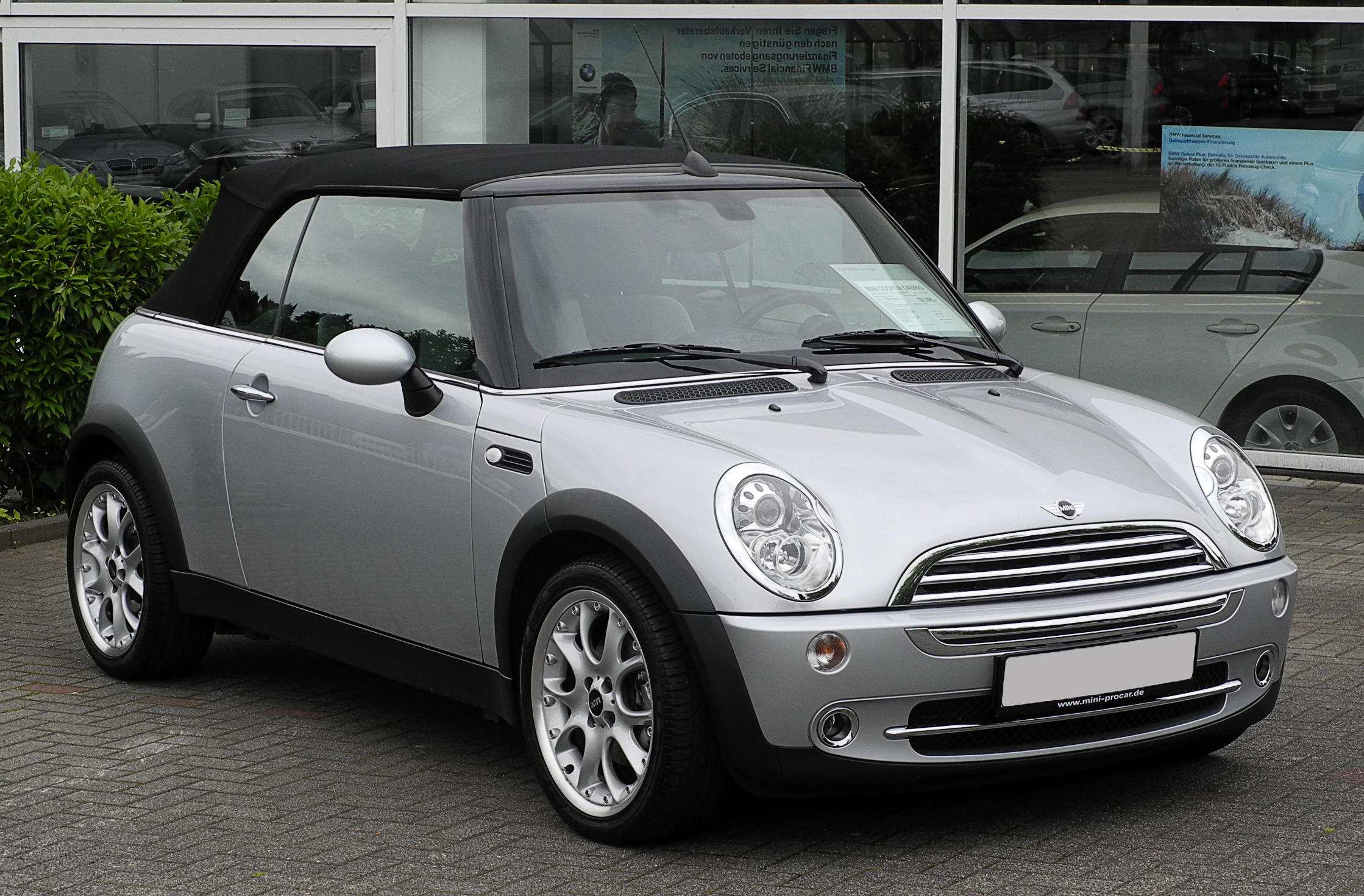 Mini Cooper Cabriolet (R52)